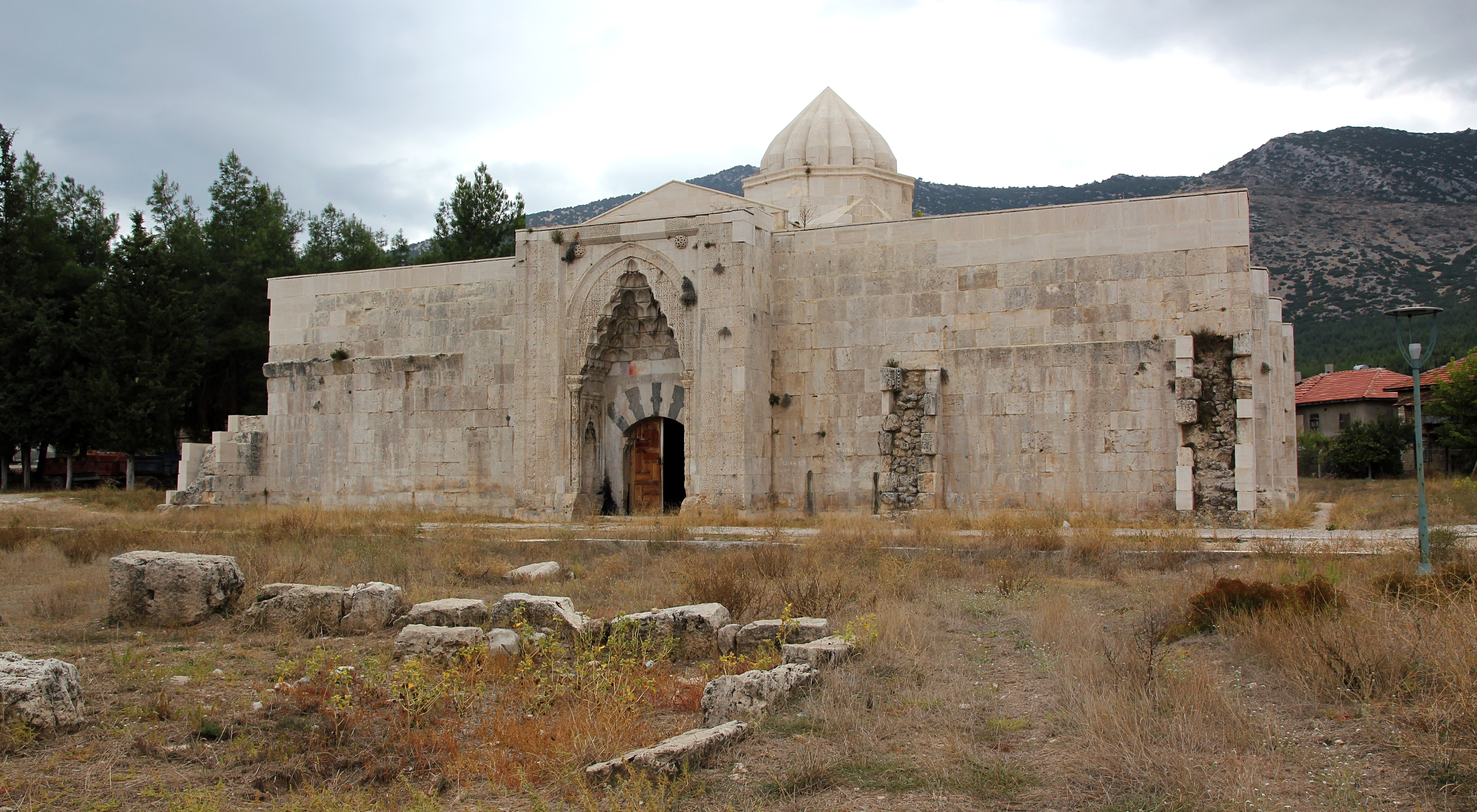 Susuz Han, seldschukische Karawanserei bei Bucak in der Südwesttürkei